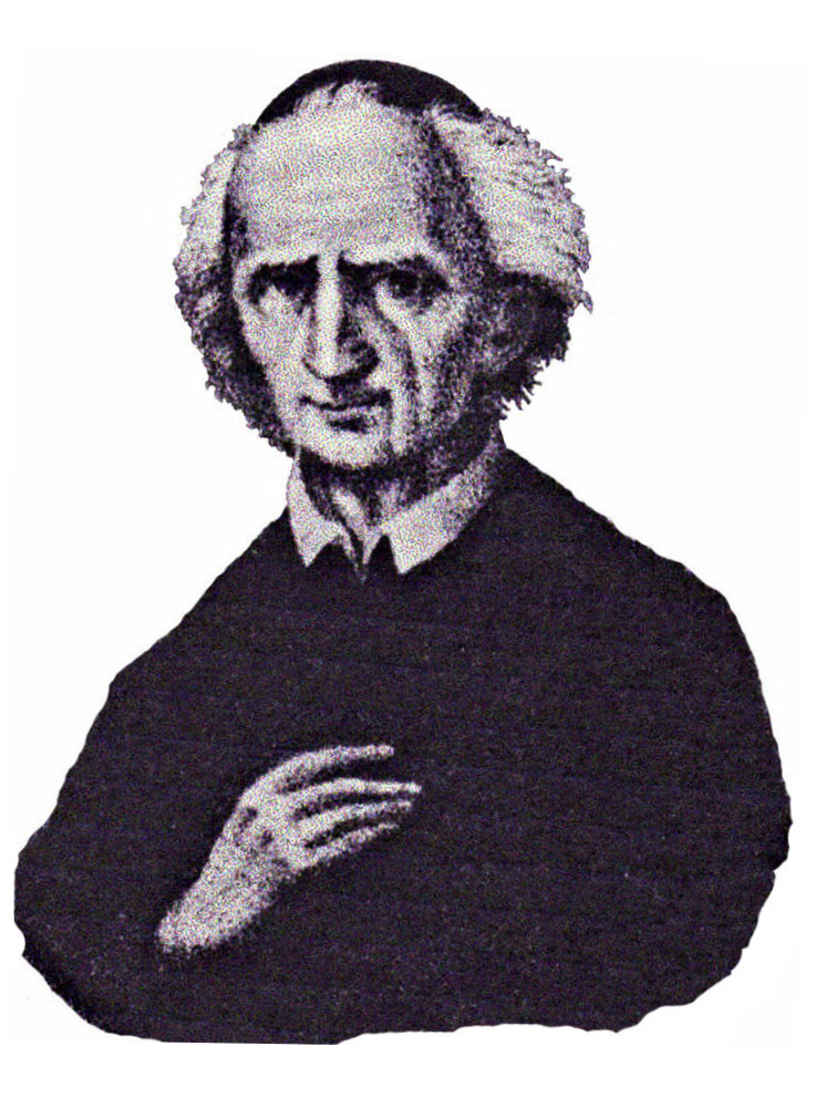 don Giovanni Antonio Rubbi, Prevosto di Sorisole dal 1740 al 1785, guaritore